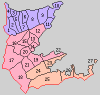 大分県北海部郡の町村制時点の町村。